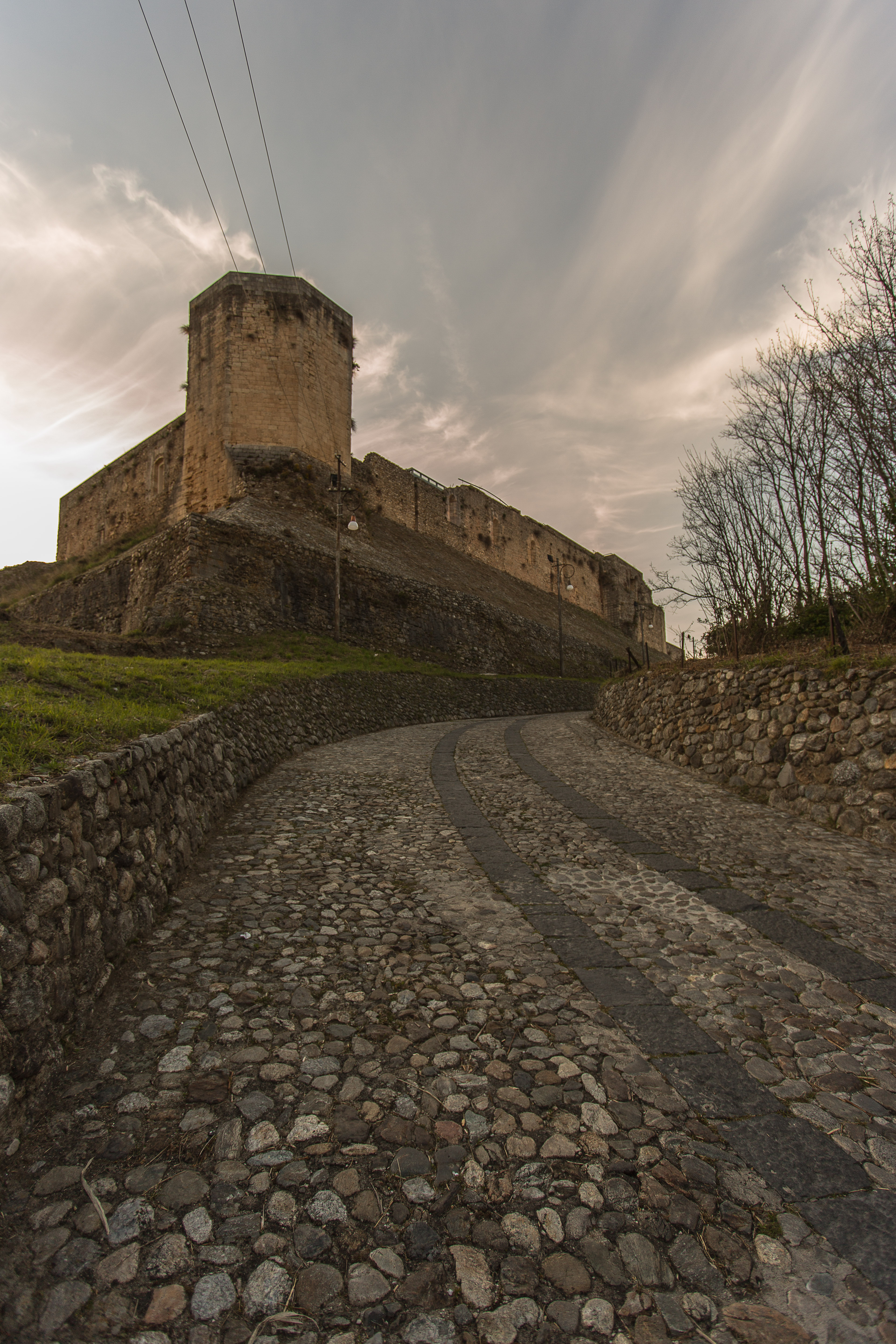 Castello Svevo This is a photo of a monument which is part of cultural heritage of Italy.